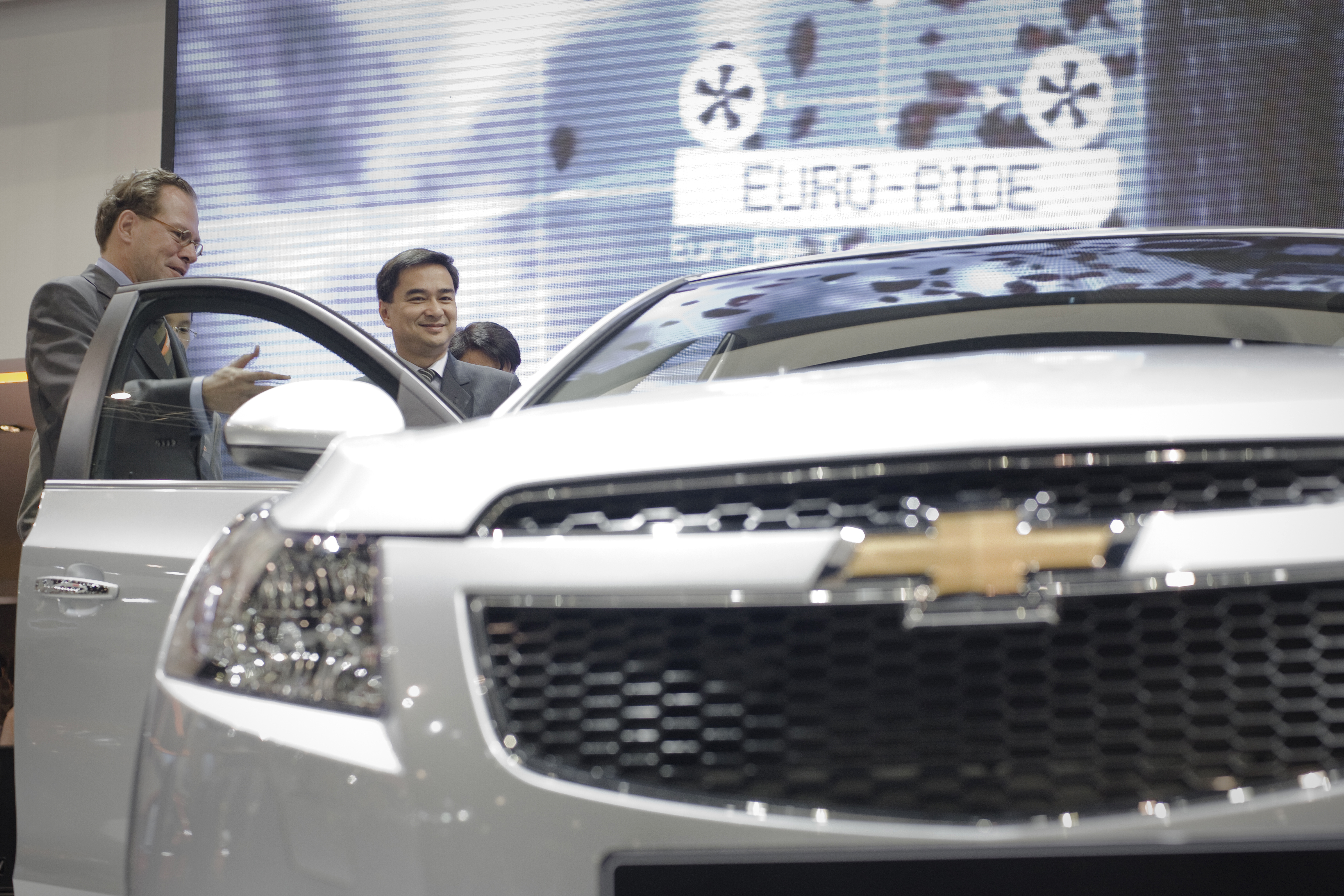 นายกรัฐมนตรีเยี่ยมชมงานมหกรรมยานยนต์ ณ ศูนย์แสดงสินค้าอิมแพ็ค เมืองทองธานี จังหวัดนนทบุรี วันพุธ ที่ 8 ธันวาคม พ.ศ.2553 (Photographer attached to the Prime Minister of the Kingdom of Thailand : Peerapat Wimolrungkarat / พีรพัฒน์ วิมลรังครัตน์) @is50mm